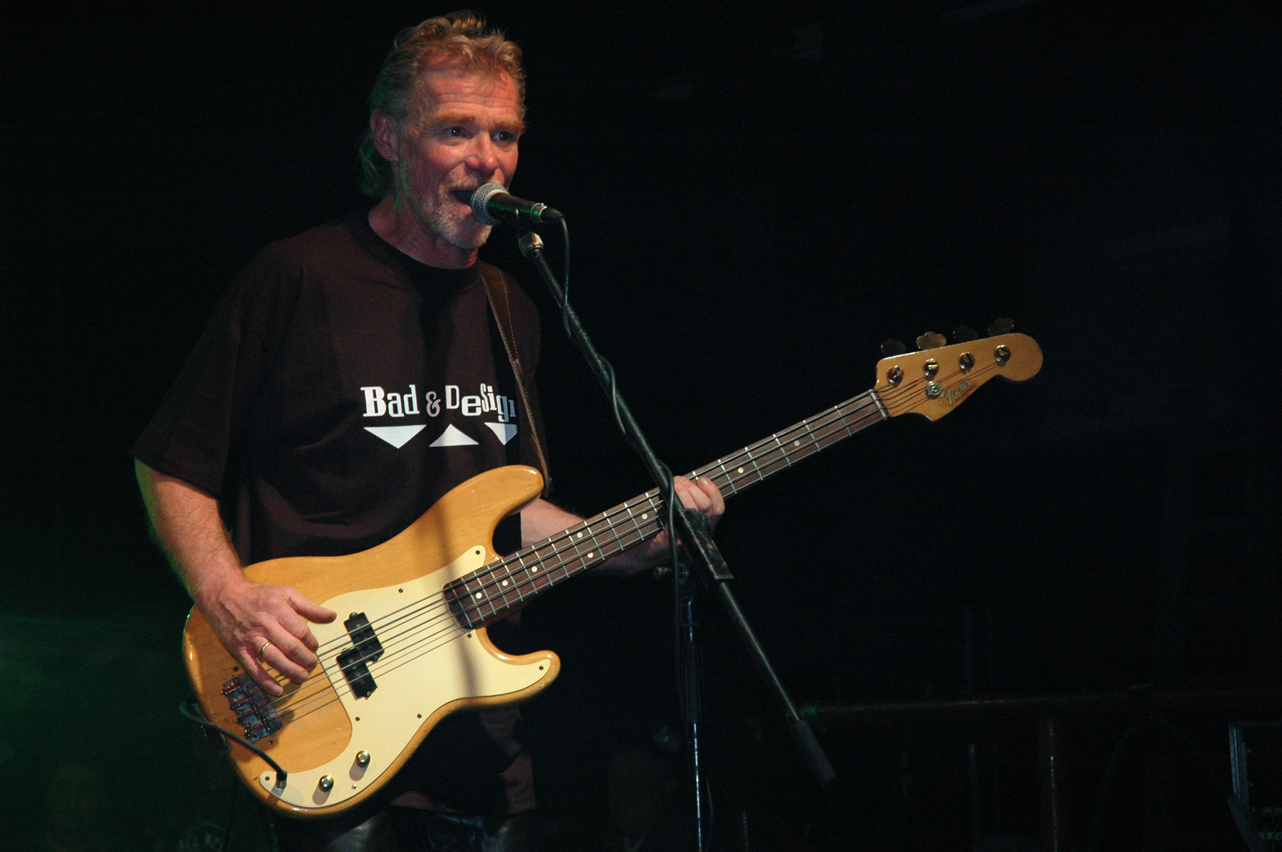 Peter Panka’s Jane live am 11.12.2004, Charly Maucher